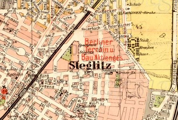 Ausschnitt aus der Beilage zum Adressbuch für Berlin und seine Vororte 1907